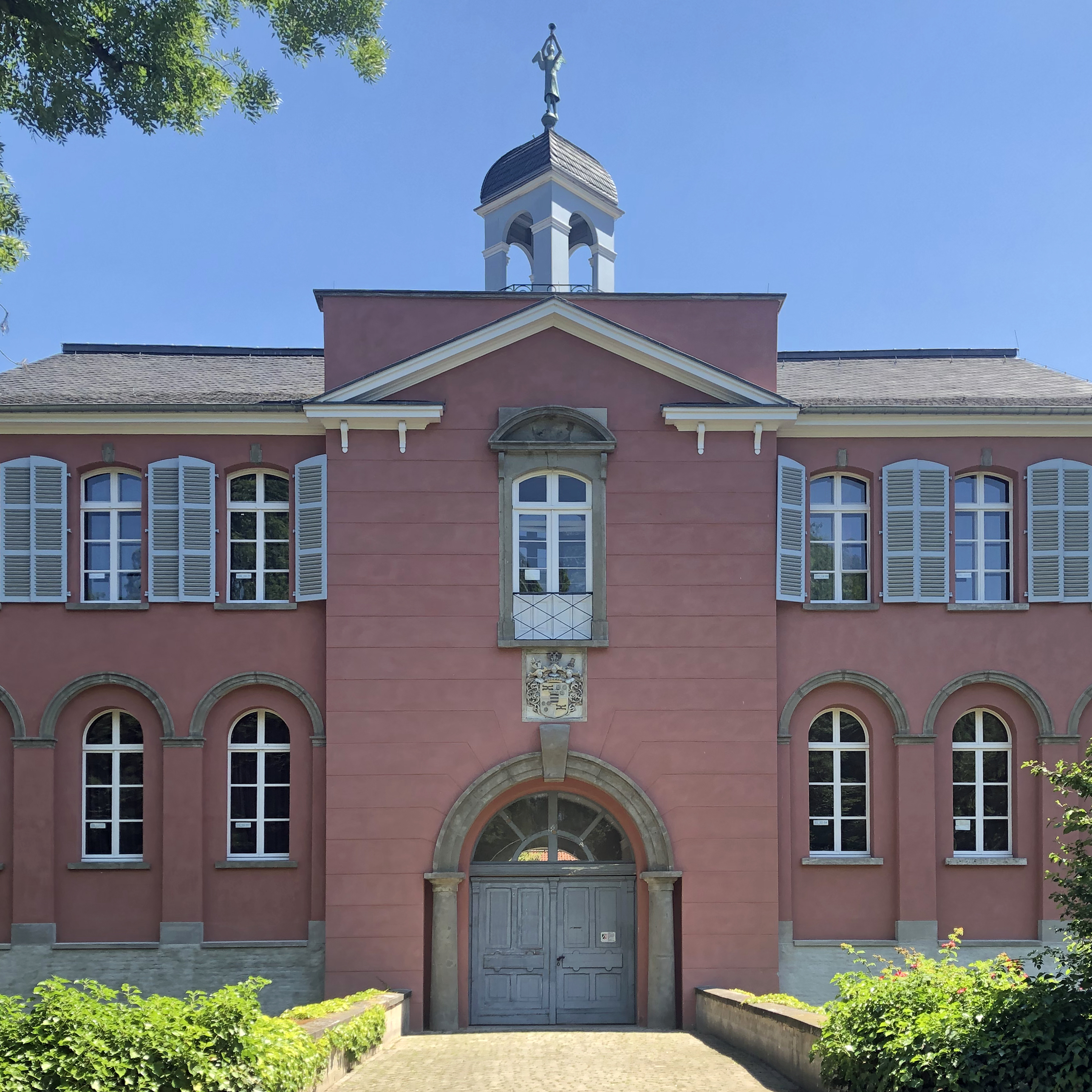 Schloss Kalkum, Eingangsportal Westen mit Wappen